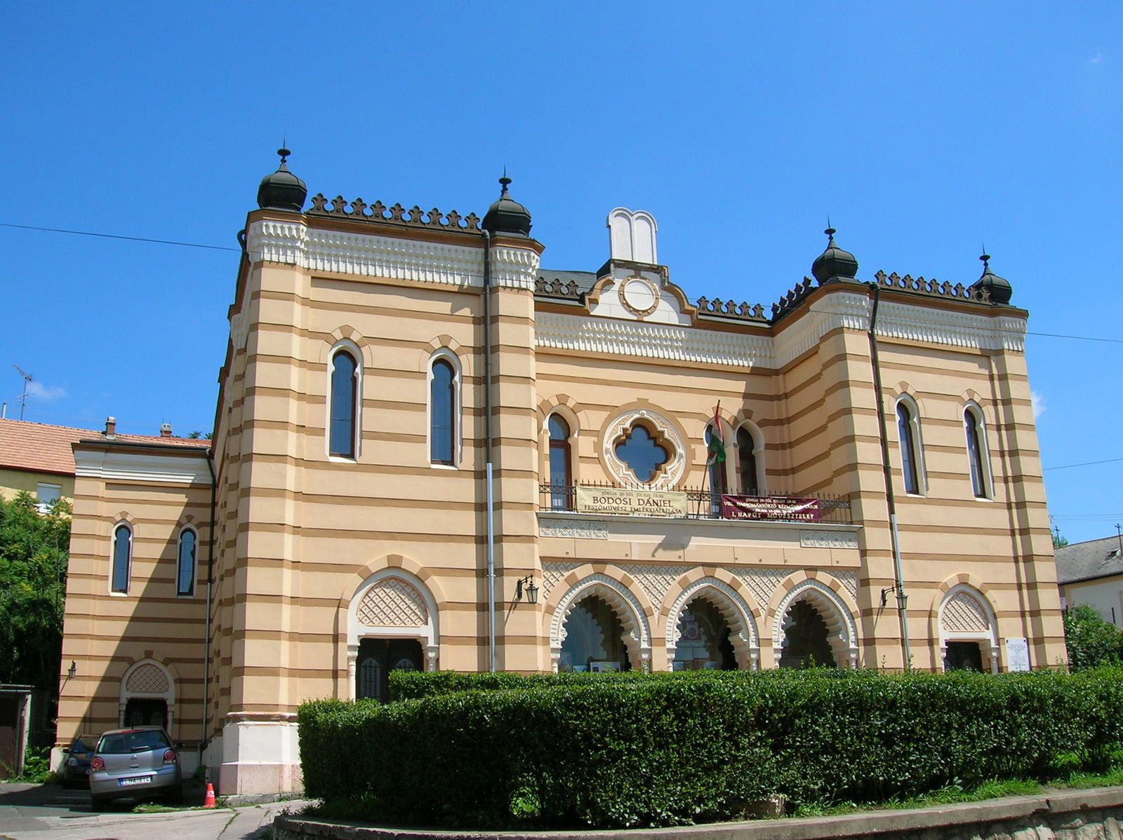 Technika Háza, egykori zsinagóga (Esztergom, Imaház u. 2/b.) This is a photo of a monument in Hungary, Identifier: 6191